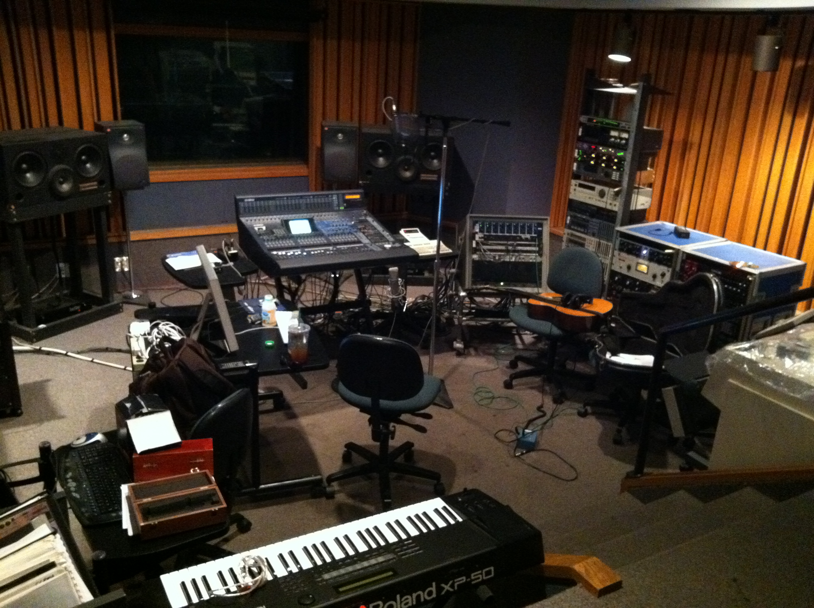 CCRMA, June 13, 2011